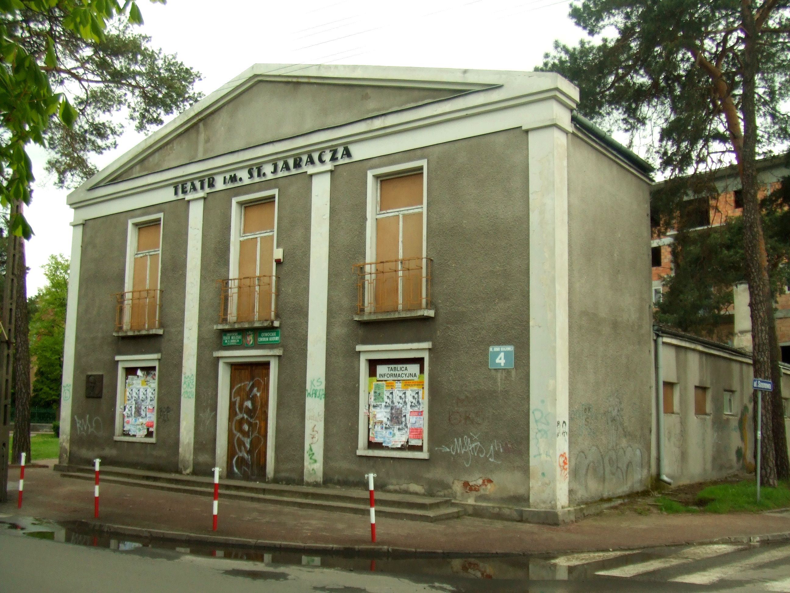 Teatr im. Stefana Jaracza w Otwocku - aktualnie zamknięty.